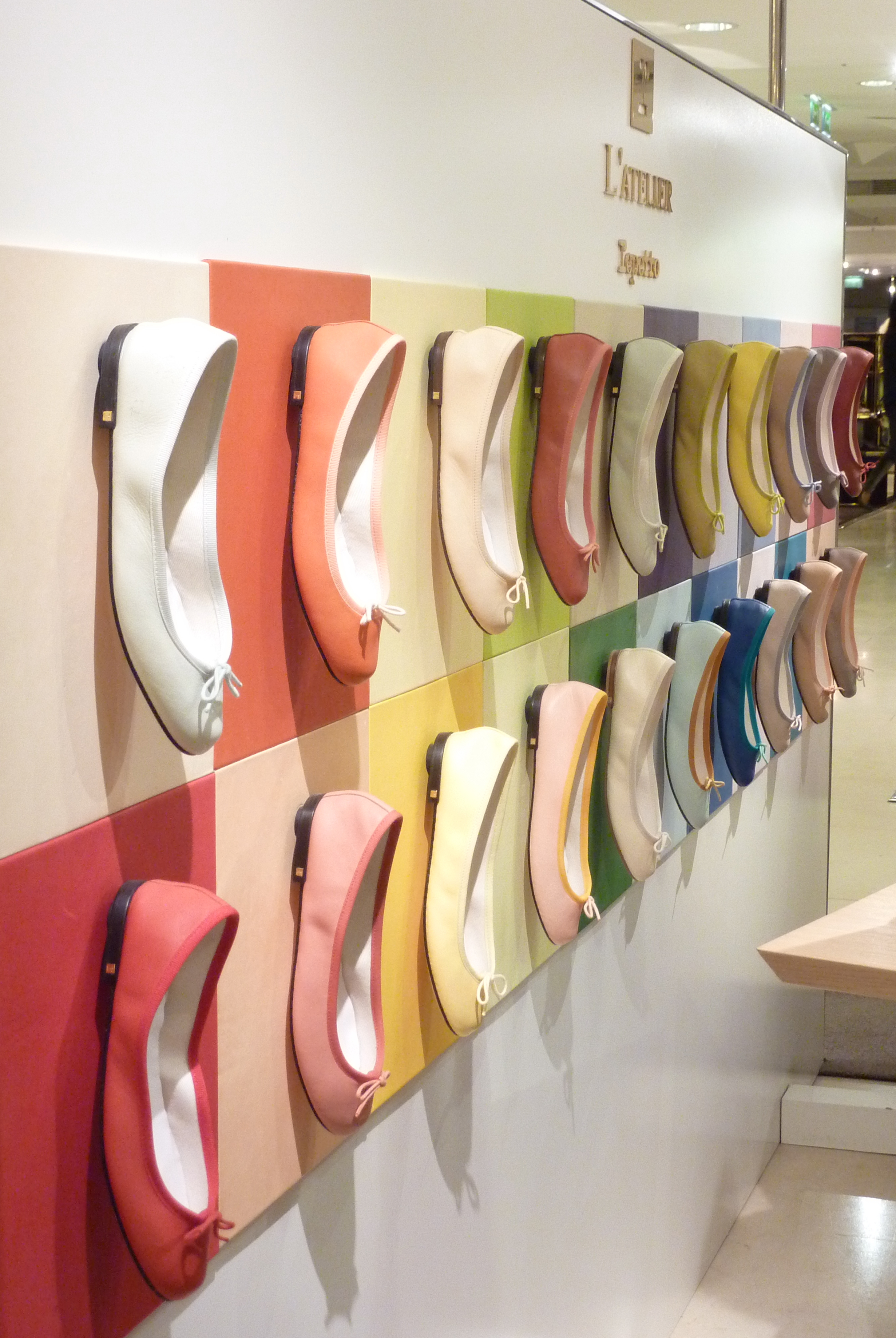 Präsentation von Repetto- Schuhen und Zubehör im Kaufhaus Printemps in Paris